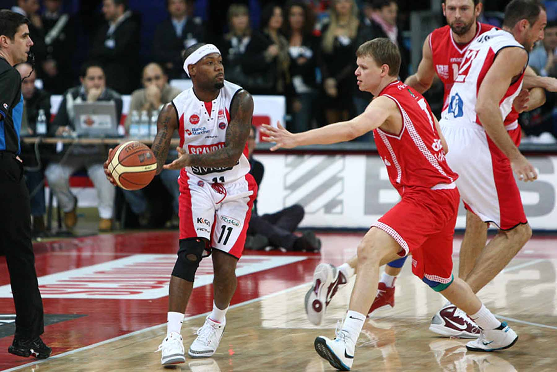 Andre Collins e Teemu Rannikko